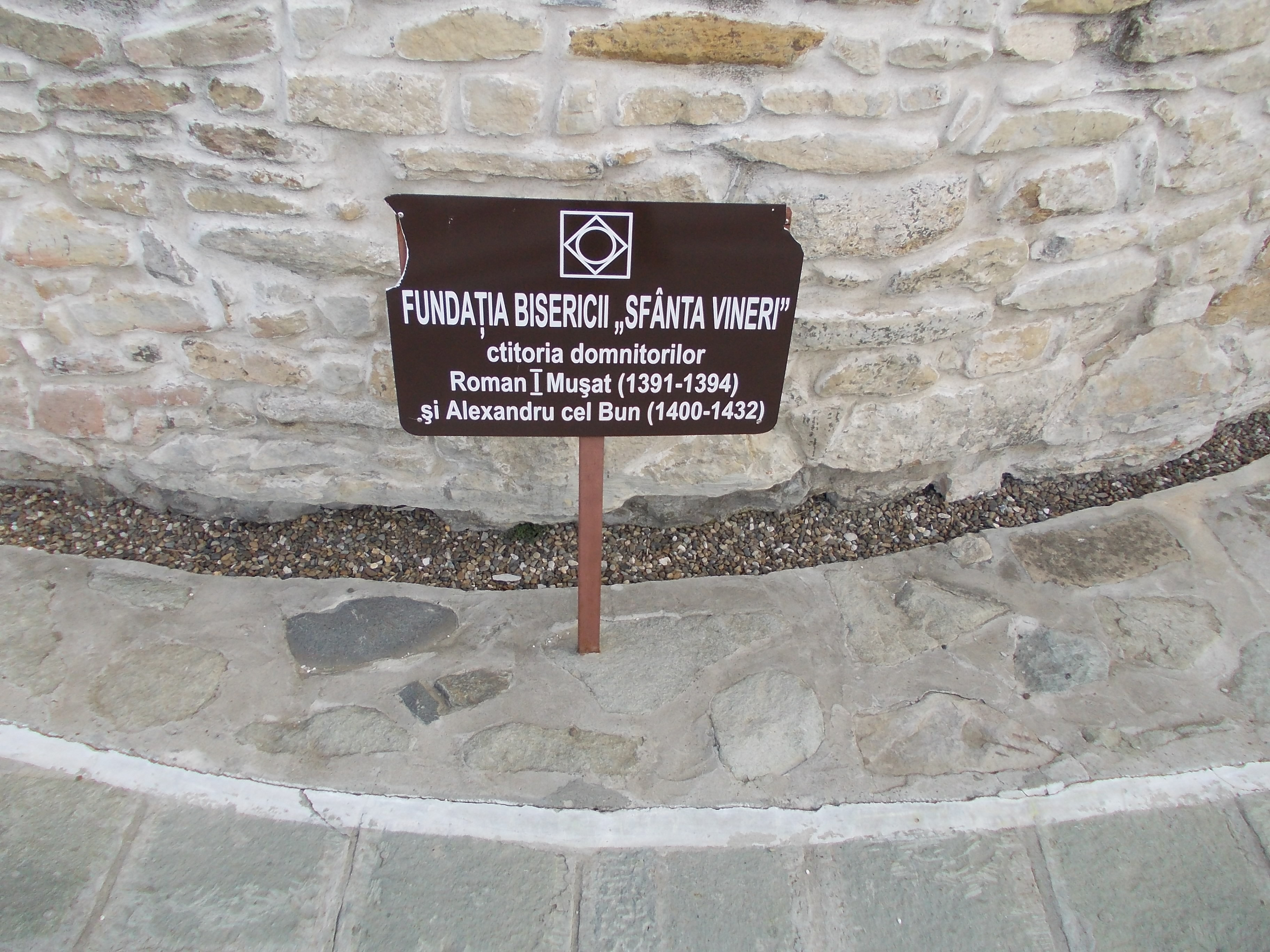 Episcopia Romanului